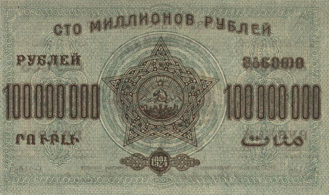 100 000 000 рублей 1924 года. ЗСФСР. Реверс.